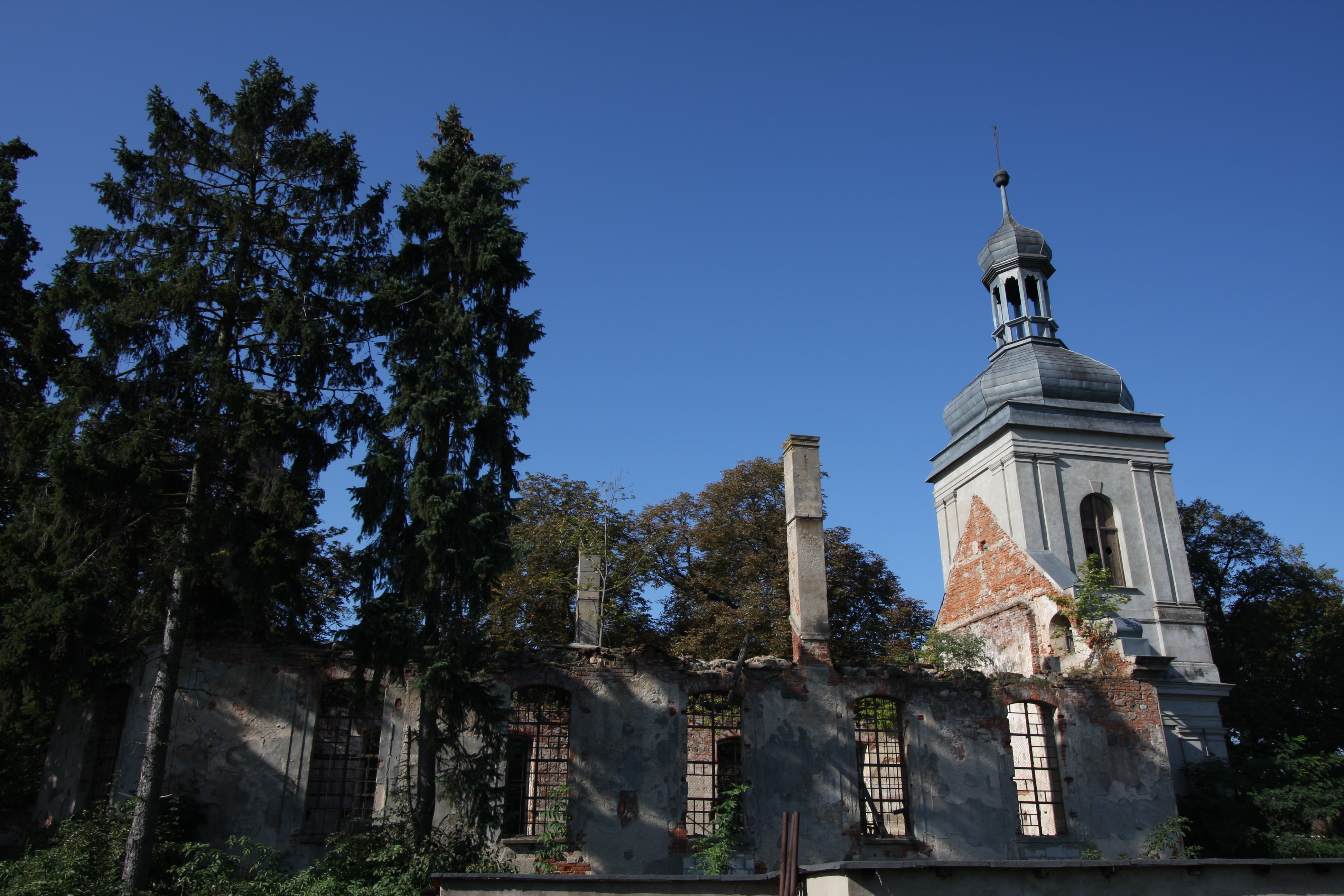 Lwówek, kościół ewangelicki, mur., 1778, al. E. Sczanieckiej